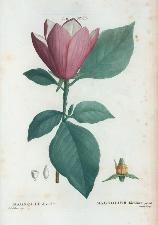 Magnolia discolor = Magnolier bicolore.